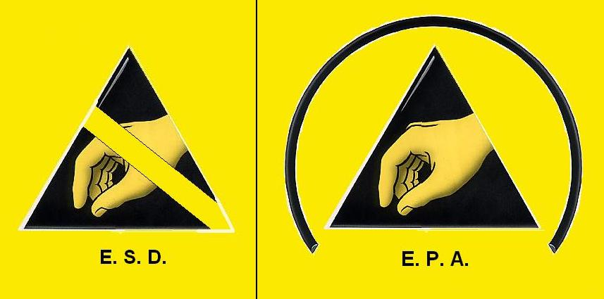 Symbole für durch elektrostatische Aufladung gefährdete elektronische Bauteile und für elektrostatisch geschützte Bereiche.